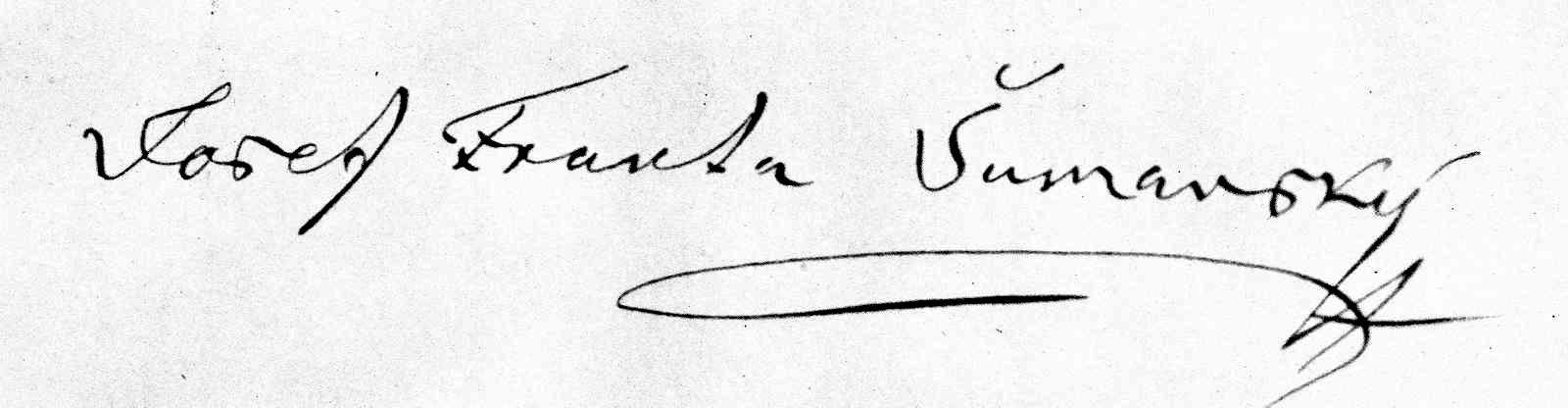 Josef Franta Šumavský (1796–1857); Podpis